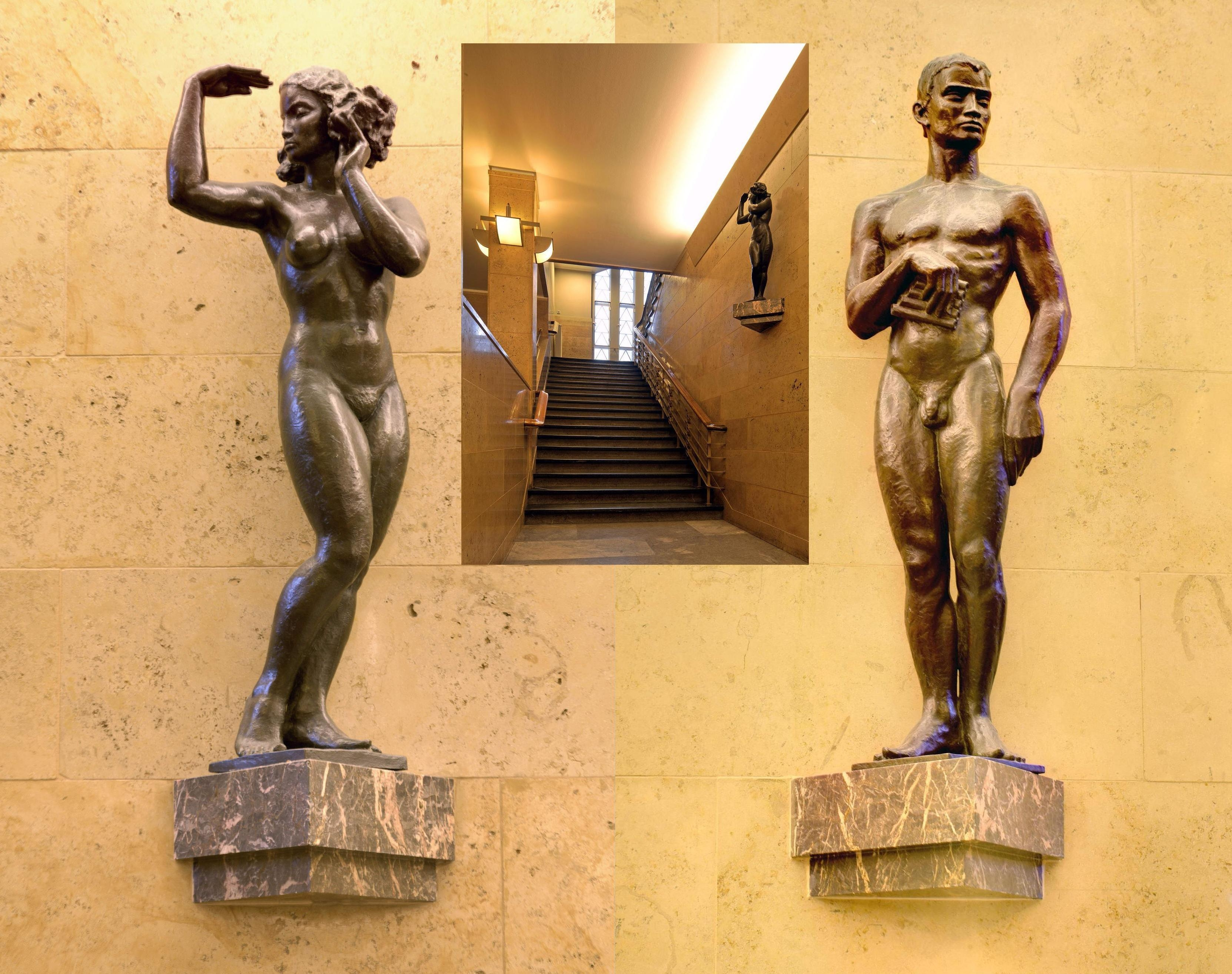 Diese allegorischen Bronzeskulpturen 'Nymphe' (110cm) und 'Faun' (115cm) wurden durch den Bildhauer Emil Rasmus Jensen (1888 - 1967) im Jahre 1930 geschaffen. Sie befinden sich im 'Deutschen Haus' in Flensburg seit dessen Eröffnung.